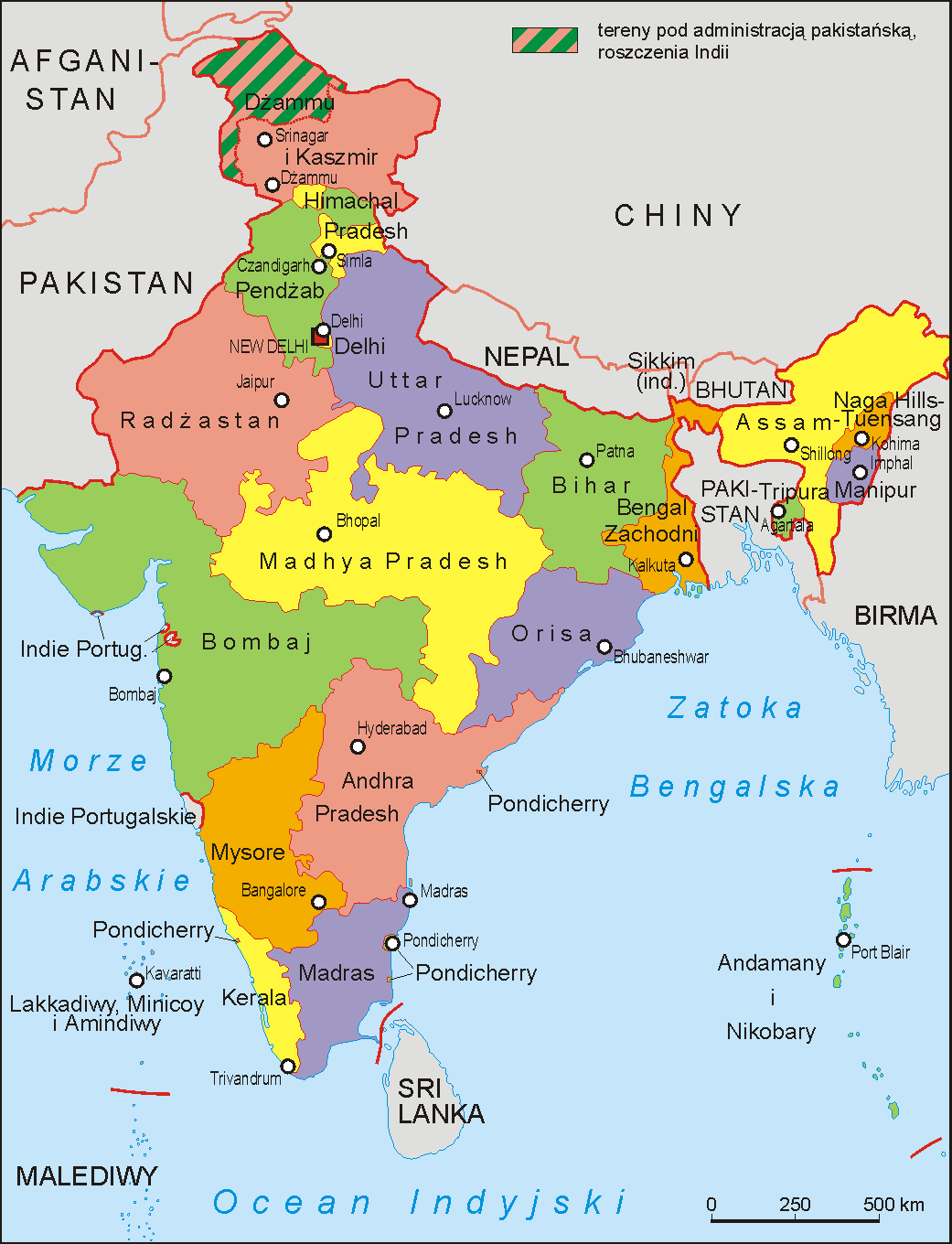 Podział administracyjny Indii w 1957 roku. Autor Aotearoa